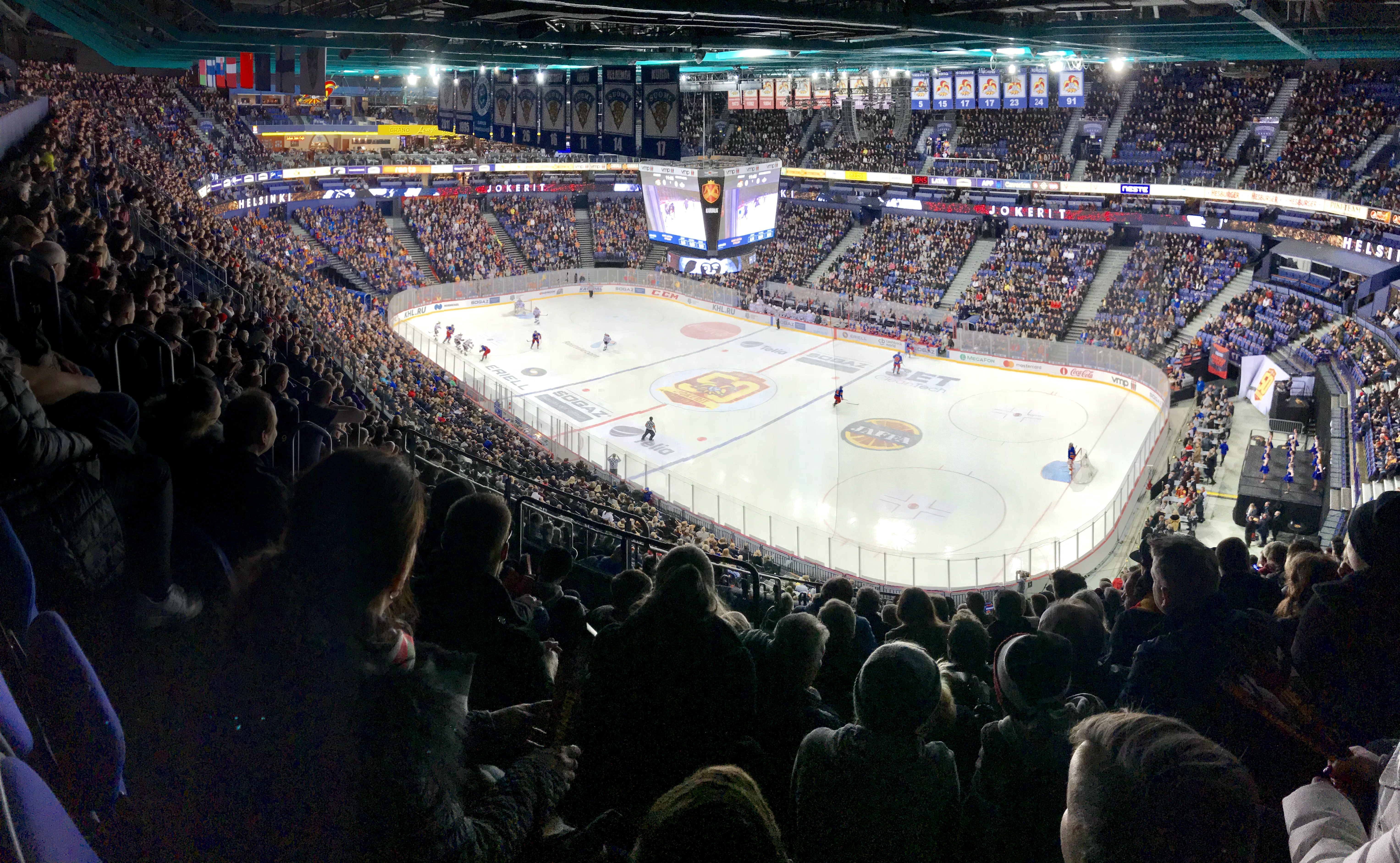 Jokerit vs. Dinamo Riga Hartwall Arena.